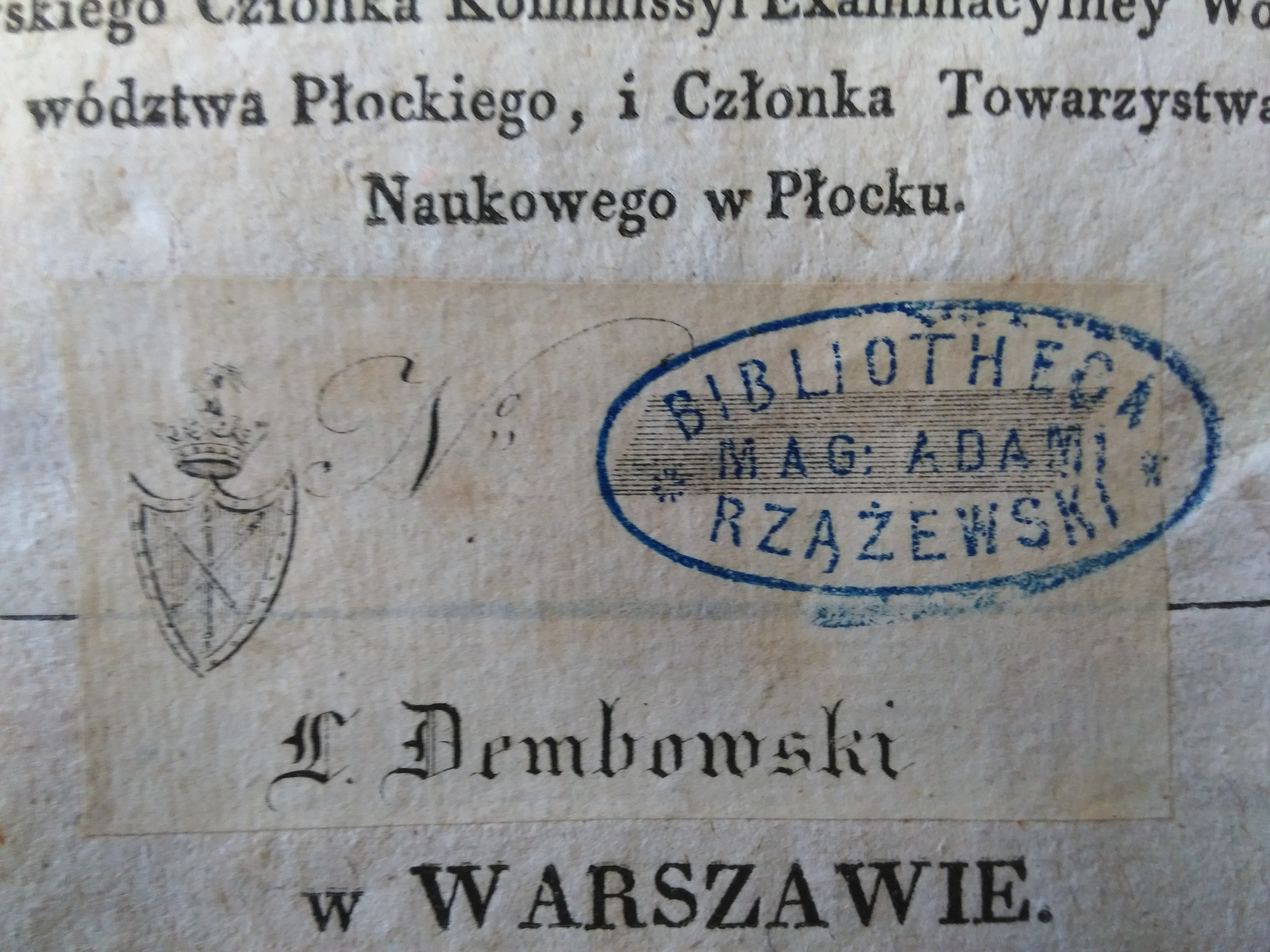 Pieczątka na książce ze zbiorów Adama Rzążewskiego. Obecnie w zbiorach Biblioteki Uniwersytekiej w Toruniu. Więcej zobacz